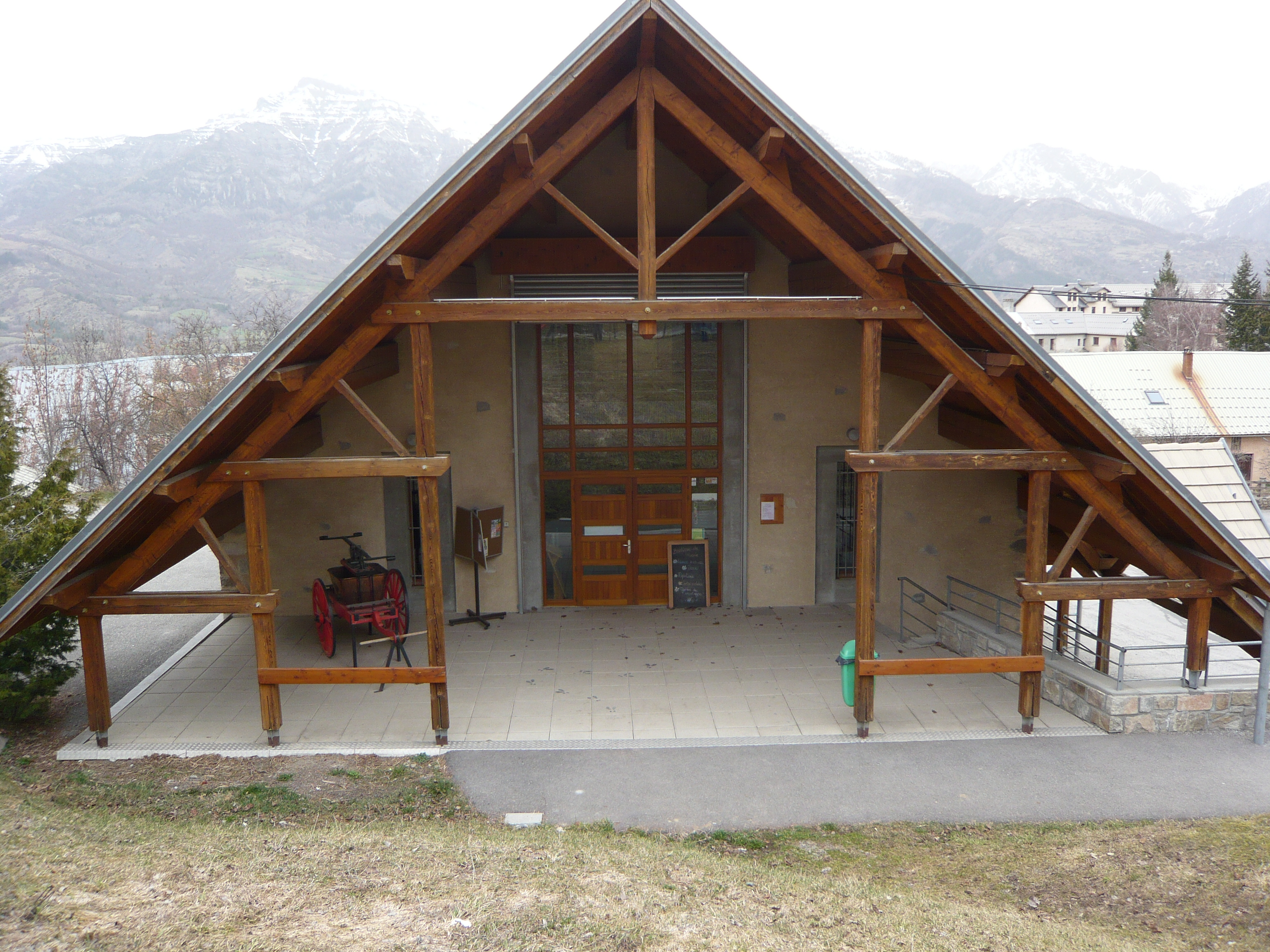 Le refuge des animaux, entrée